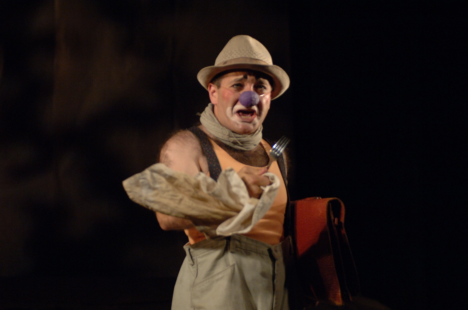 אלכסנדר סנדרוביץ'- יאקיש ופופצ'ה - 2007